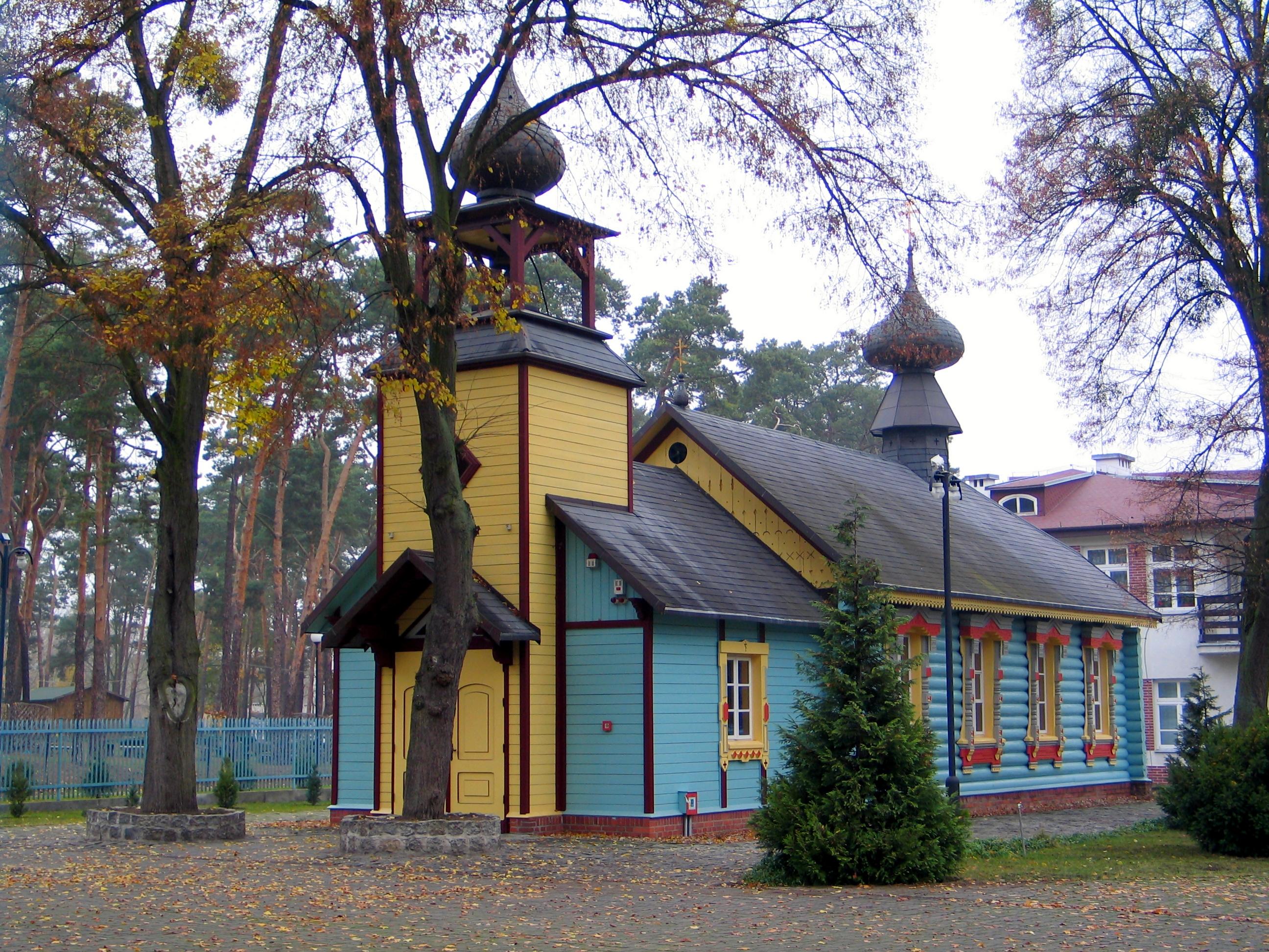 Cerkiew sw. Michala Archanioła w Ciechocinku